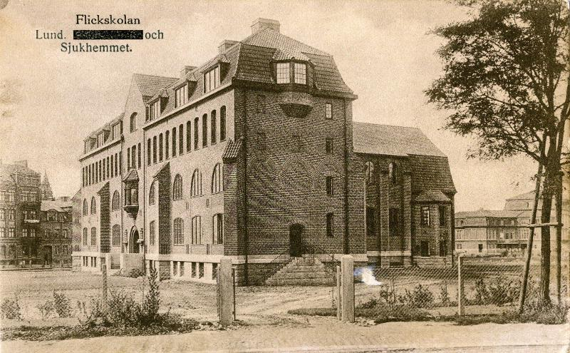 Lindbergska skolan i Lund. Byggdes 1914-16 av Läroverksföreningen i Lund byggnads AB. Arkitekter: Hagström & Ekman